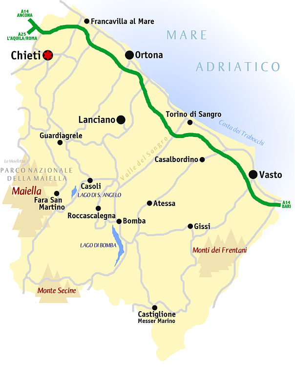 Kaartje provincie Chieti